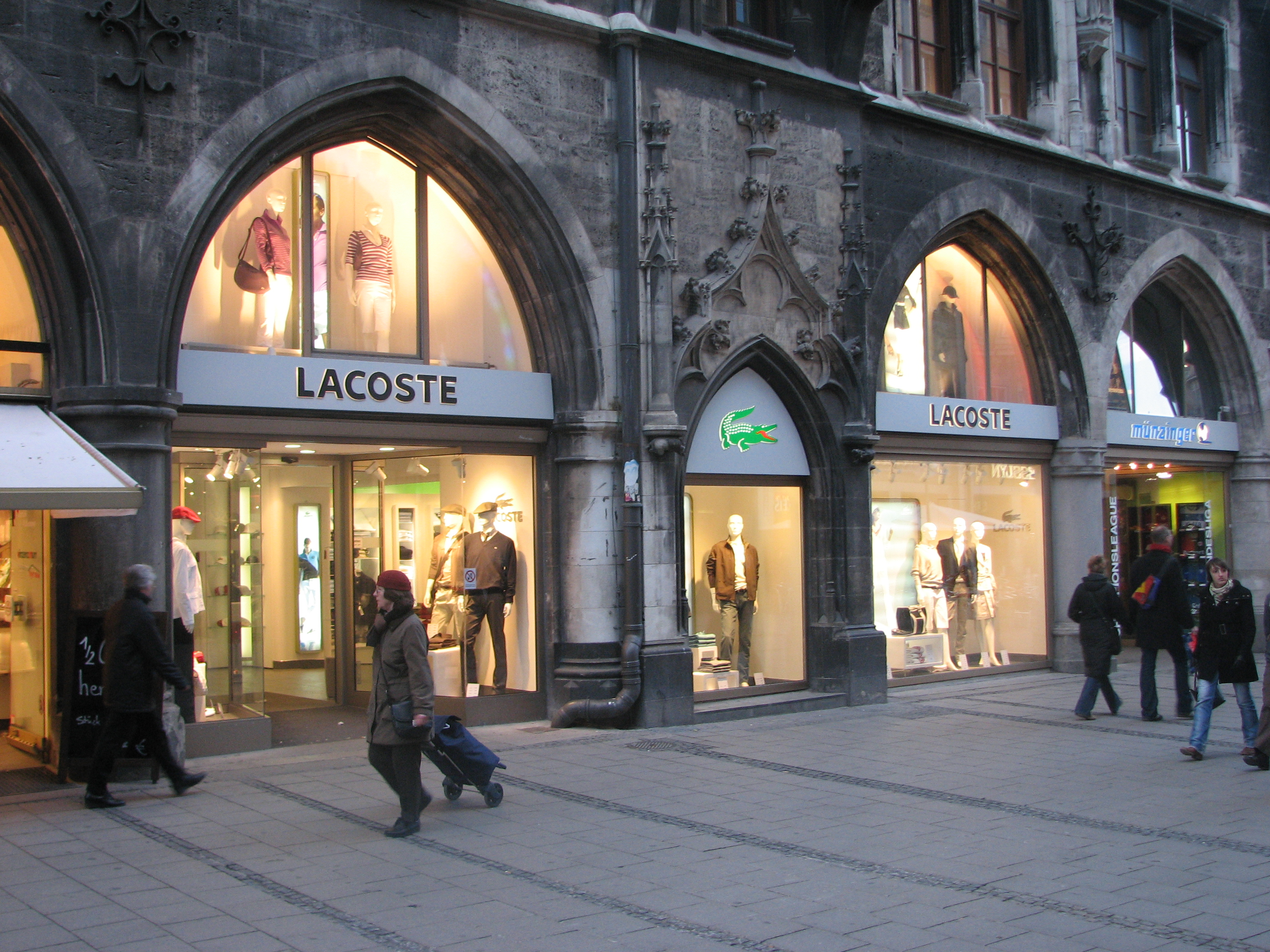 Lacoste Store Munich